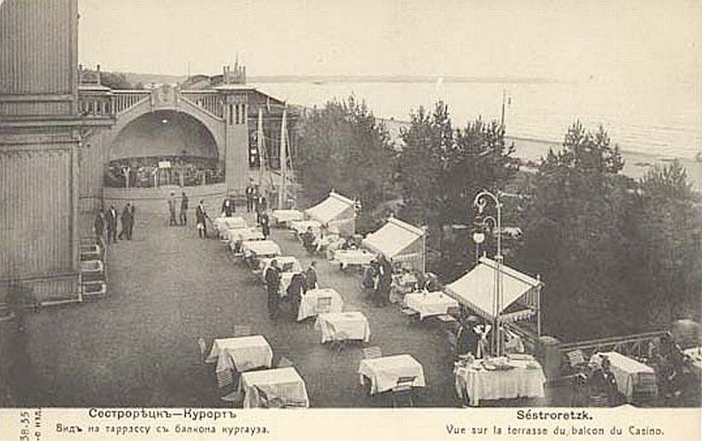 Сестрорецкий курзал